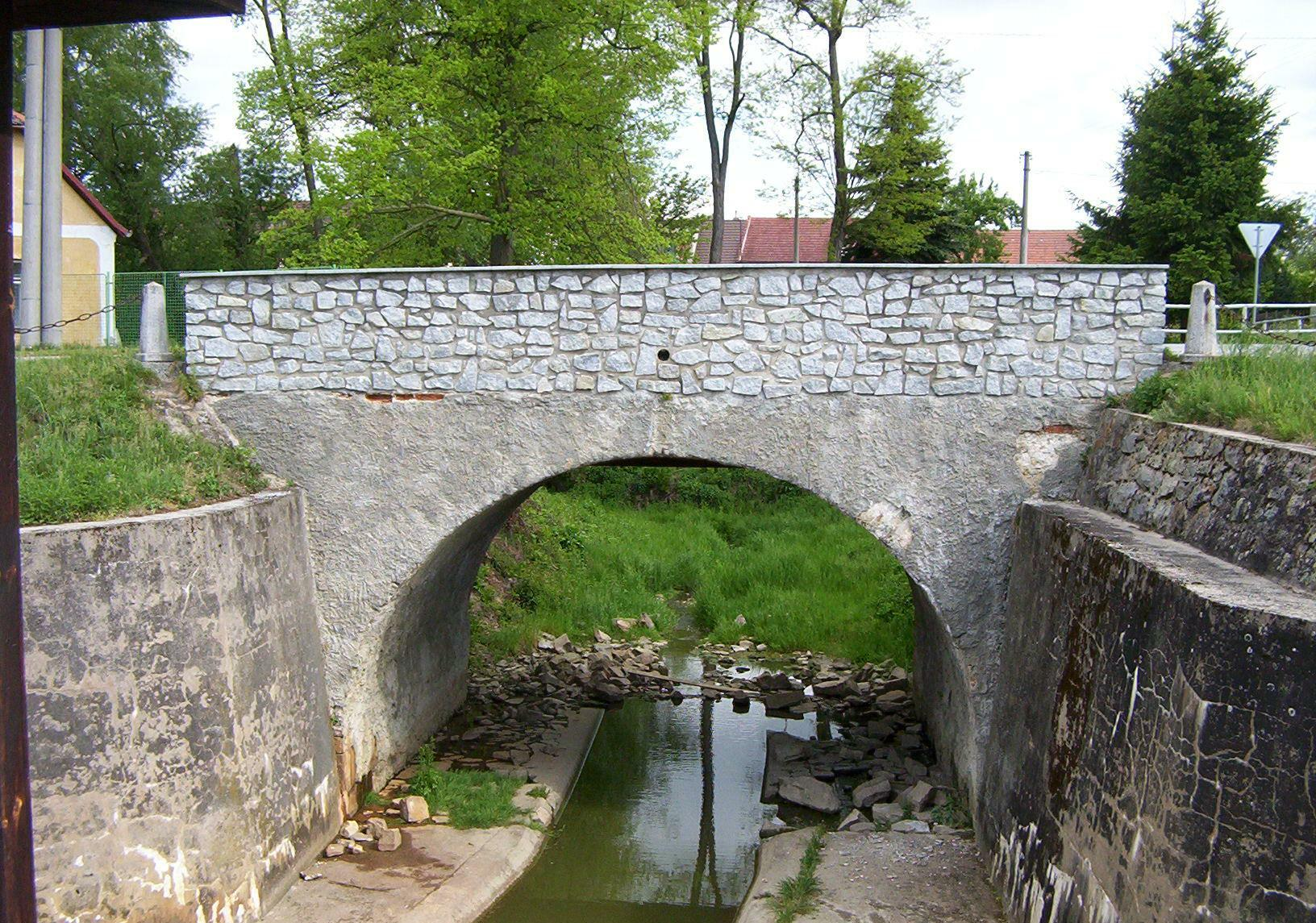 Česky: Bošilecký mostek